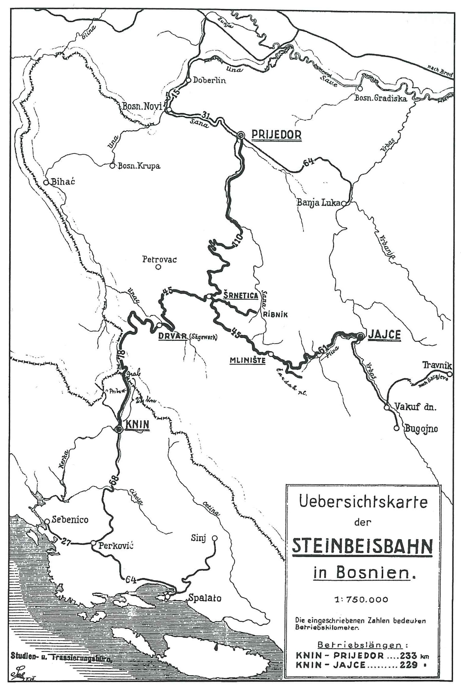 Steinbeisbahn: Übersichtskarte